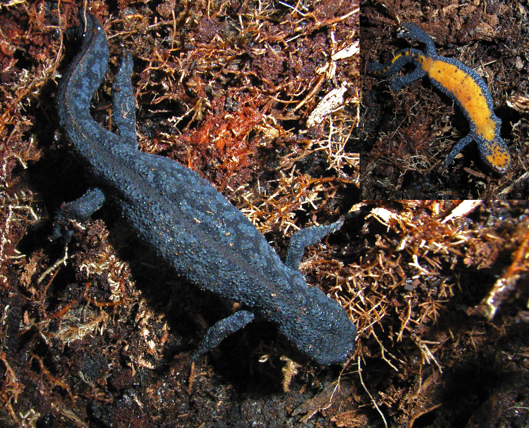 Triturus alpestris (W), Oldenburg, Niedersachsen